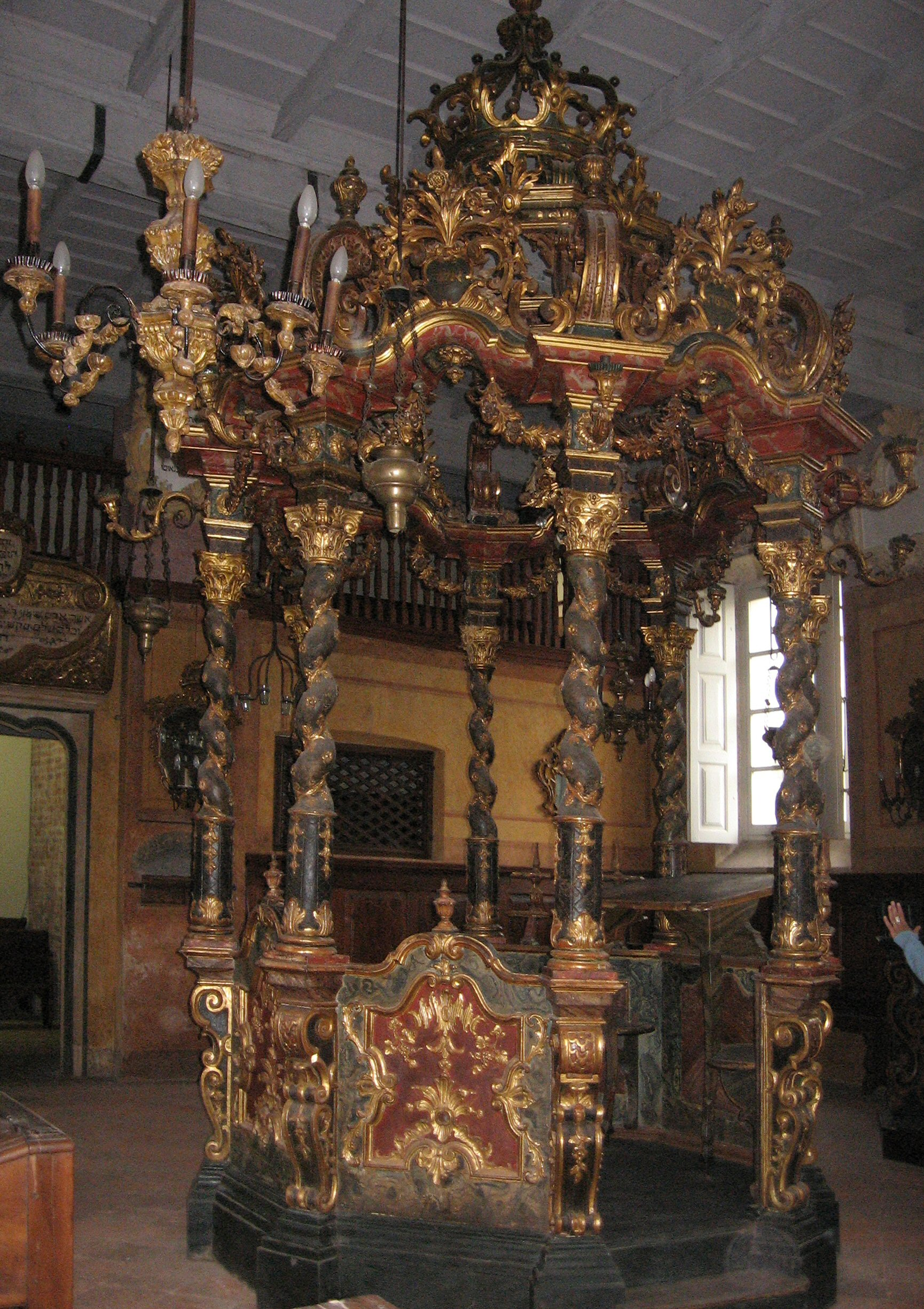 Arredo liturgico barocco nella Sinagoga di Carmagnola.